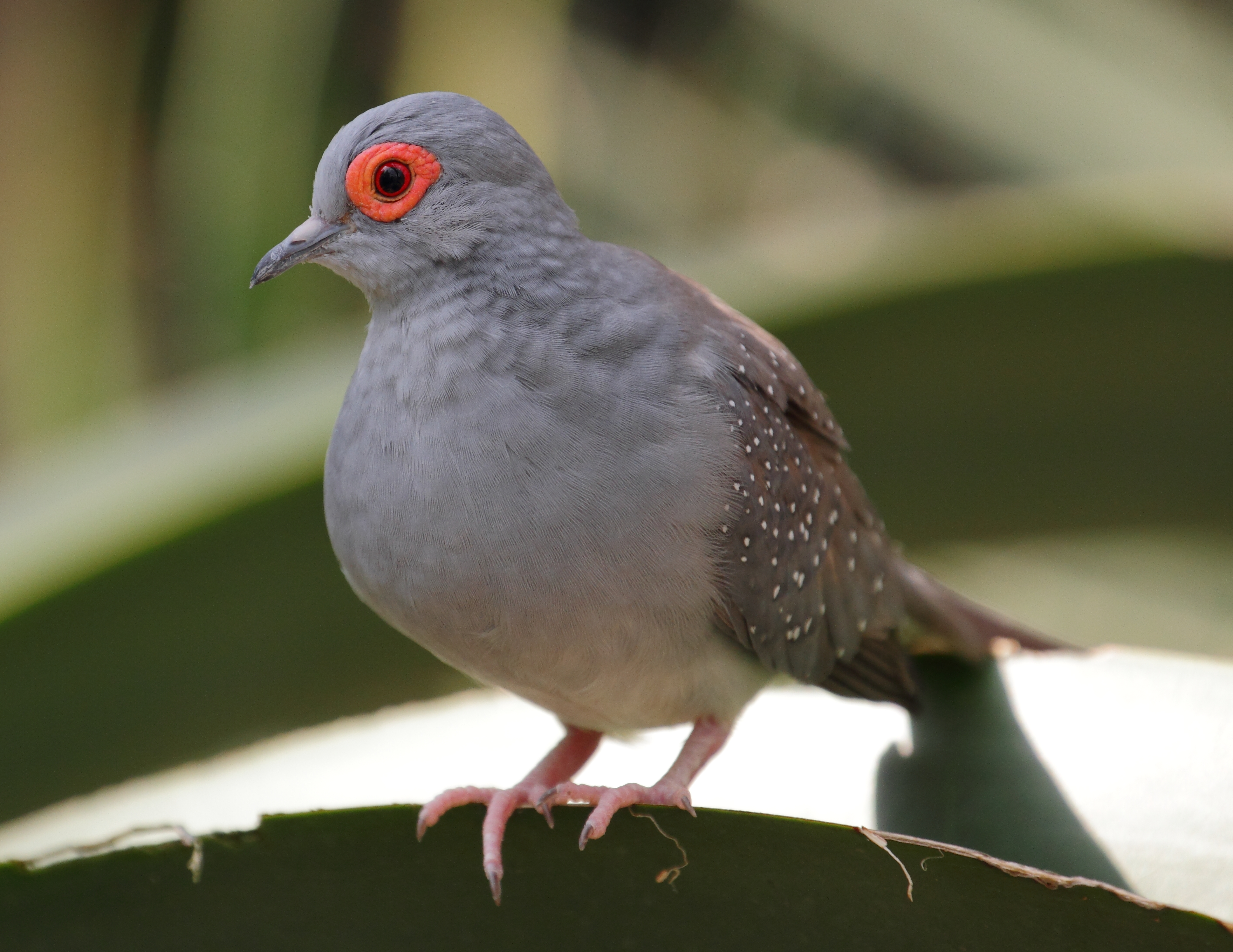 Ein Diamanttäubchen im Wüstenhaus.